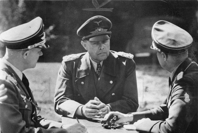 Generalfeldmarschall Kesselring bei unseren erfolgreichen Jagdfliegen an der Front mit Kommodore des Horst-Wessel-Geschwaders. 7698-40